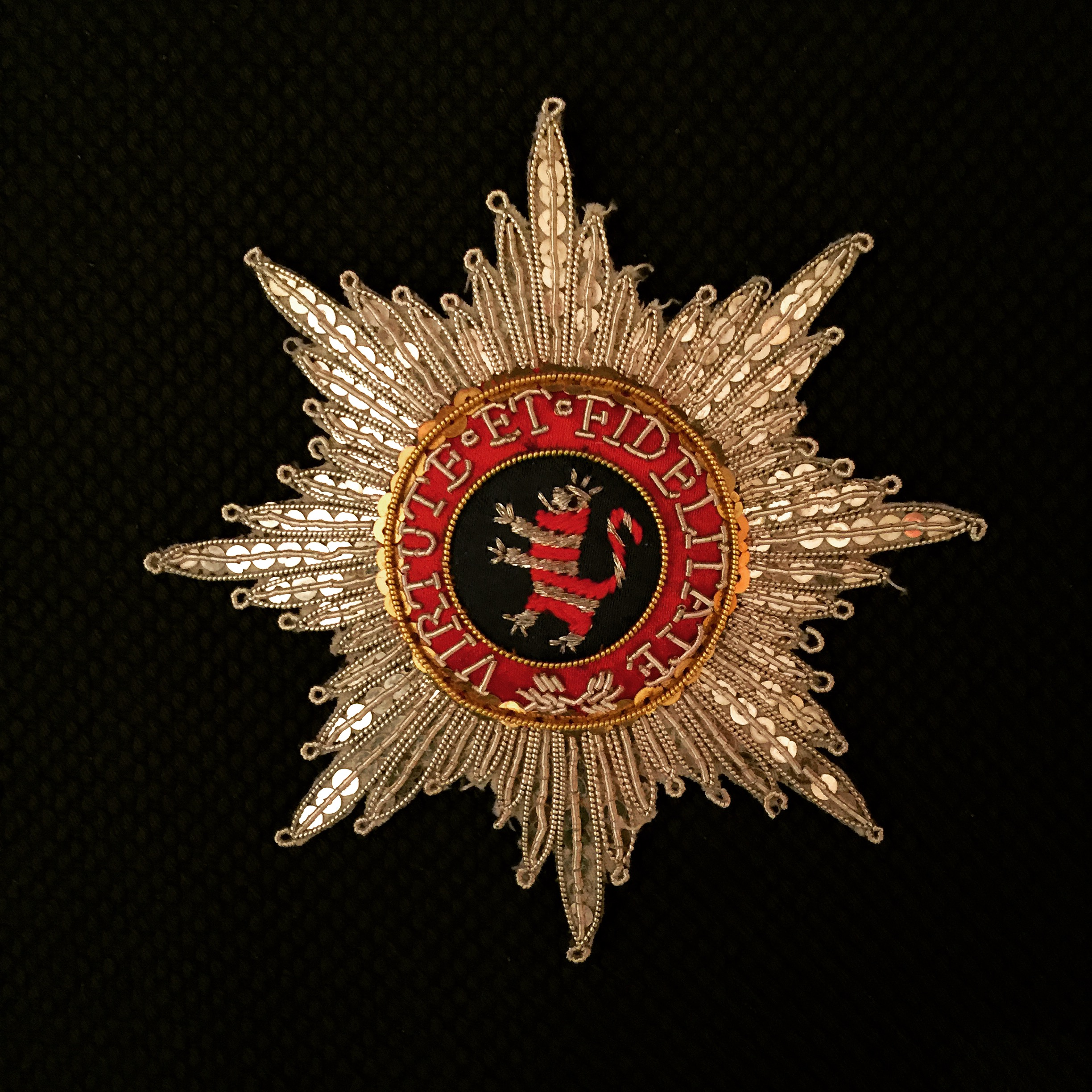 Bruststern